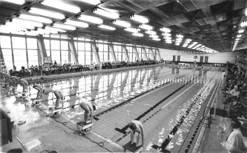 Leipzig, Deutsche Hochschule für Körperkultur, Schwimmhalle ADN-ZB Kluge 23.9.1985 Leipzig: DHfK-Schwimmhalle. Blick in die Schwimmhalle der Deutschen Hochschule für Körperkultur Leipzig während der DDR-Meisterschaften im Sportschwimmen im Juni 1985. Das 50-m-Becken wird für die Ausbildung der in- und ausländischen Studenten und auch für das Training des SC DMfK genutzt.